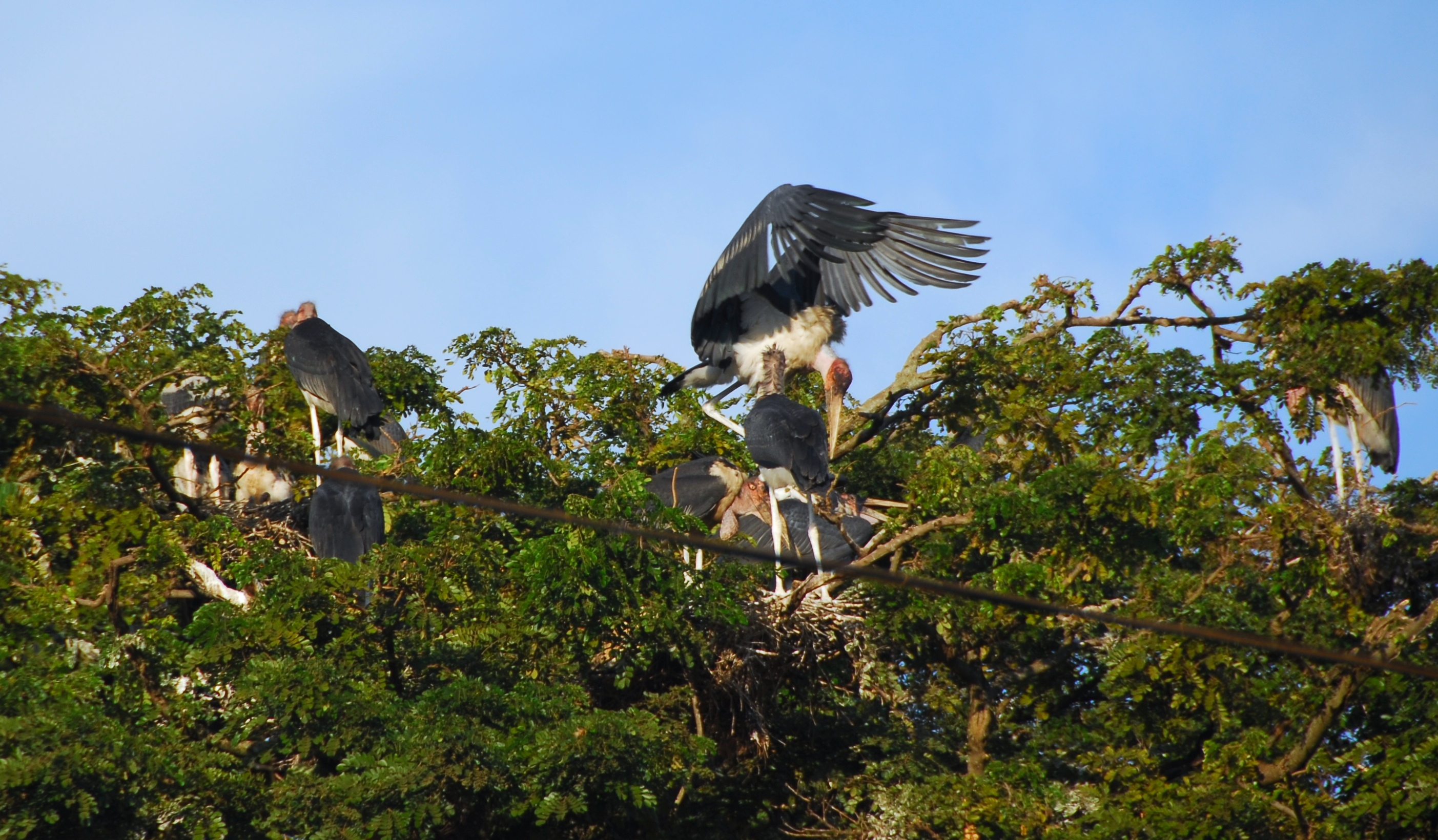 africa0703-0959a